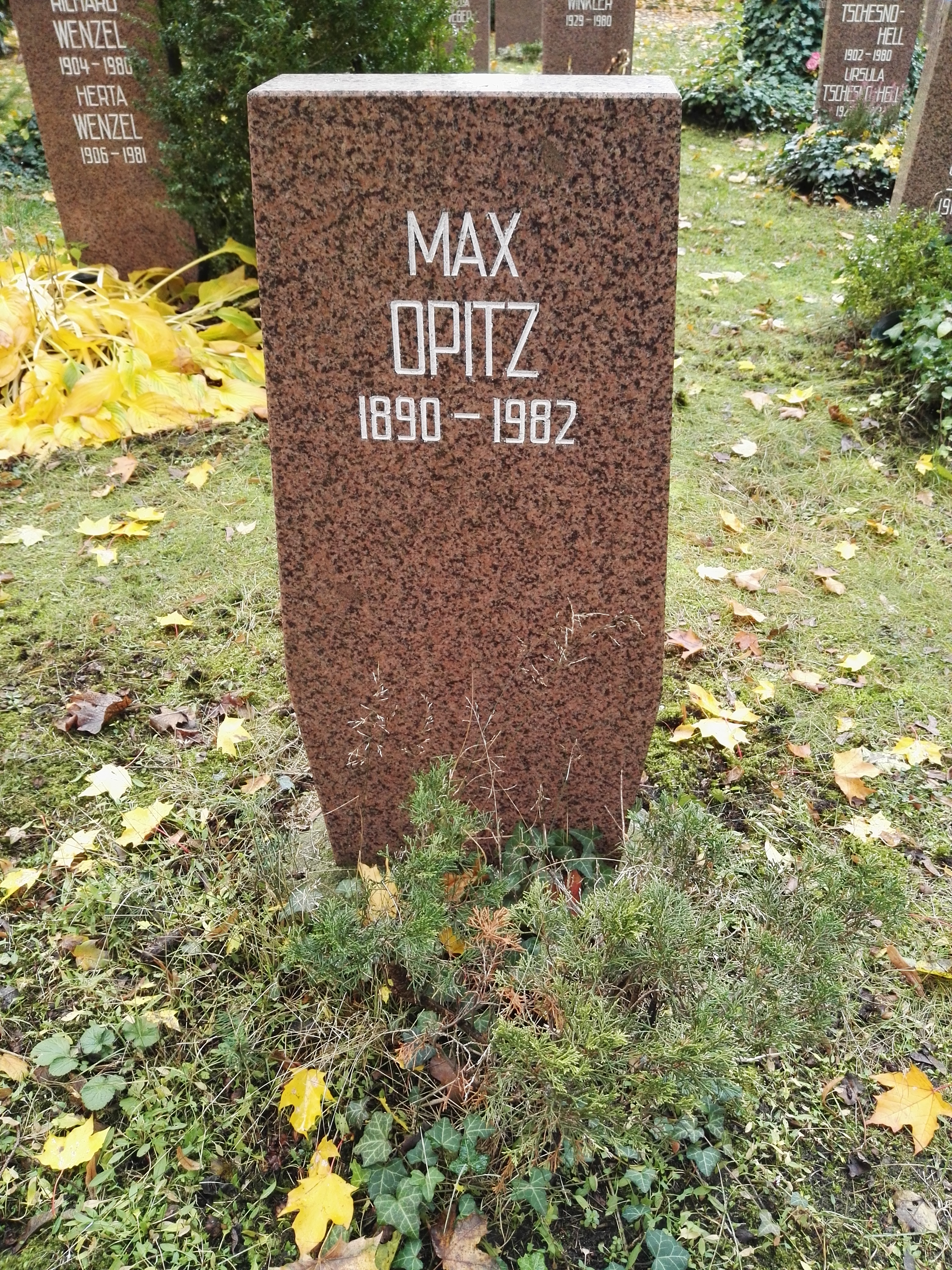 Grab von Max Ernst Opitz auf dem Sozialistenfriedhof des Zentralfriedhofs Friedrichsfelde